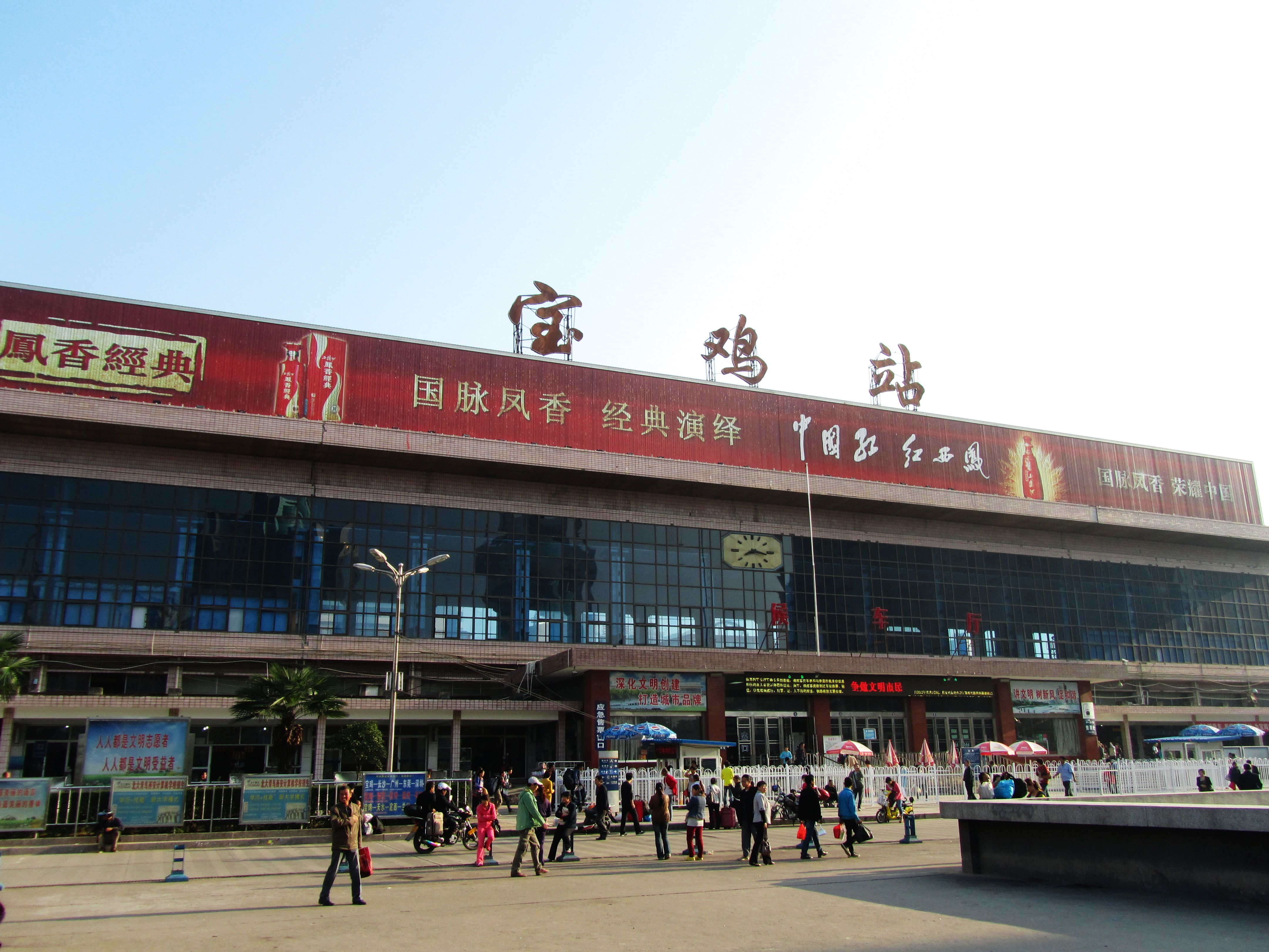 宝鸡站，自西南看。